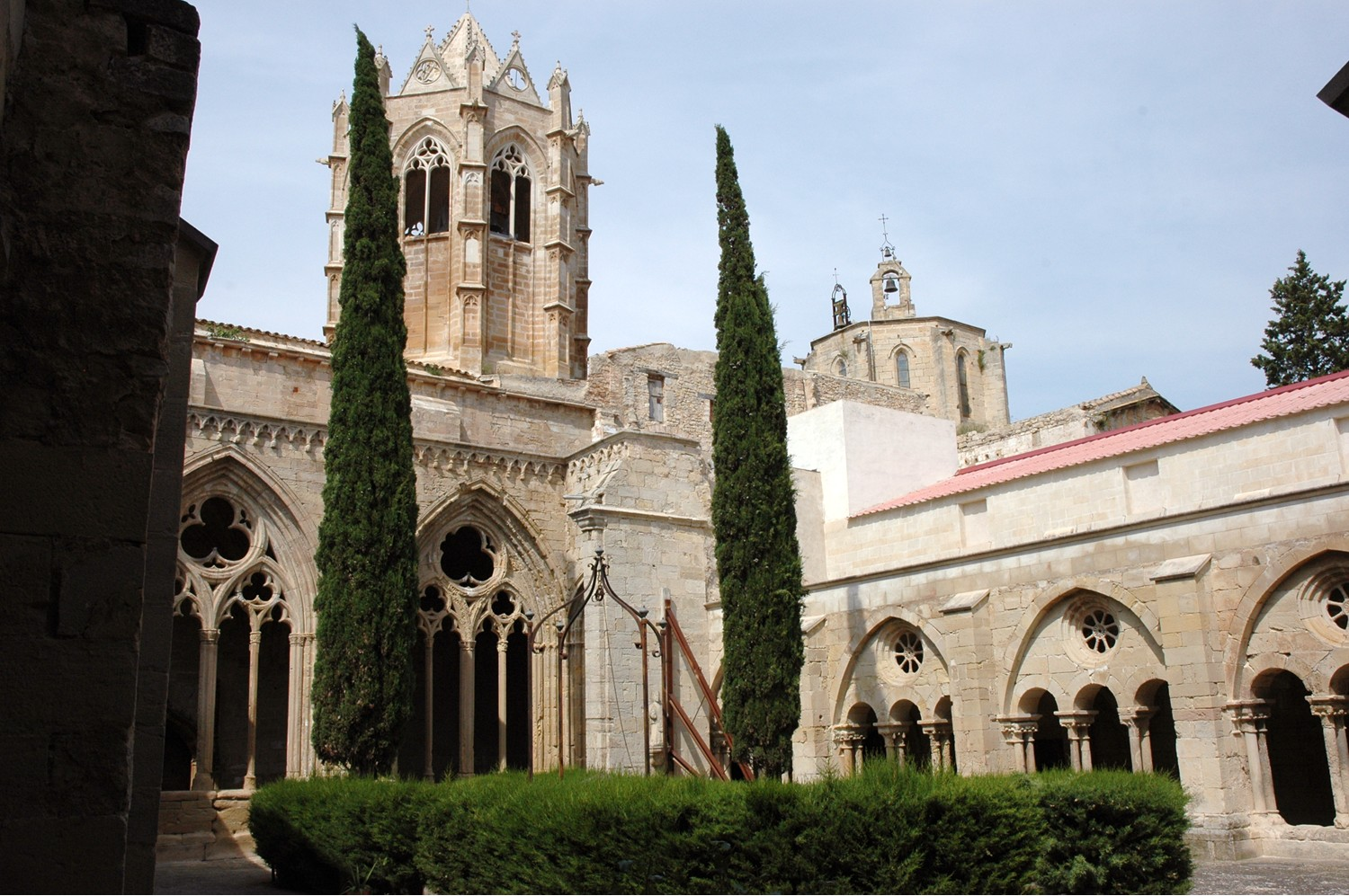 Vallbona de les Monges, Urgell, Catalonia